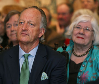 Fürst Karl Friedrich von Hohenzollern, Chef des Hauses Hohenzollern-Sigmaringen, auf Schloss Huis Bergh